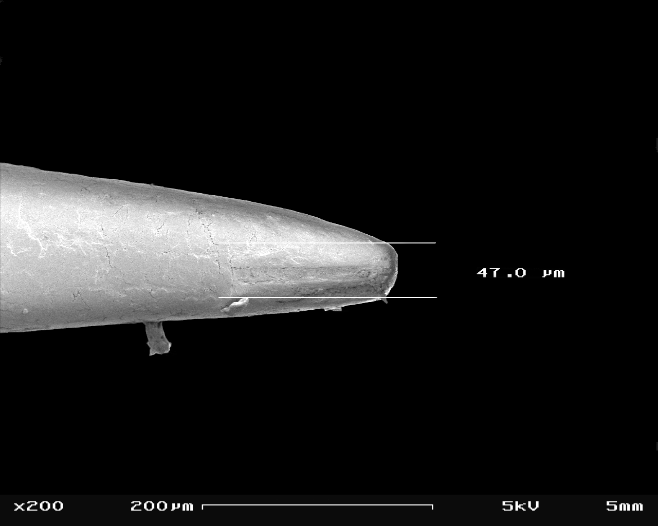 Hedgehog sting in SEM, 200x